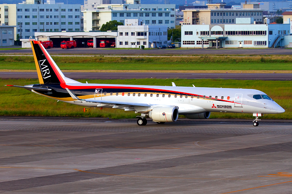 1st MRJ aircraft is taxiing at RJNA